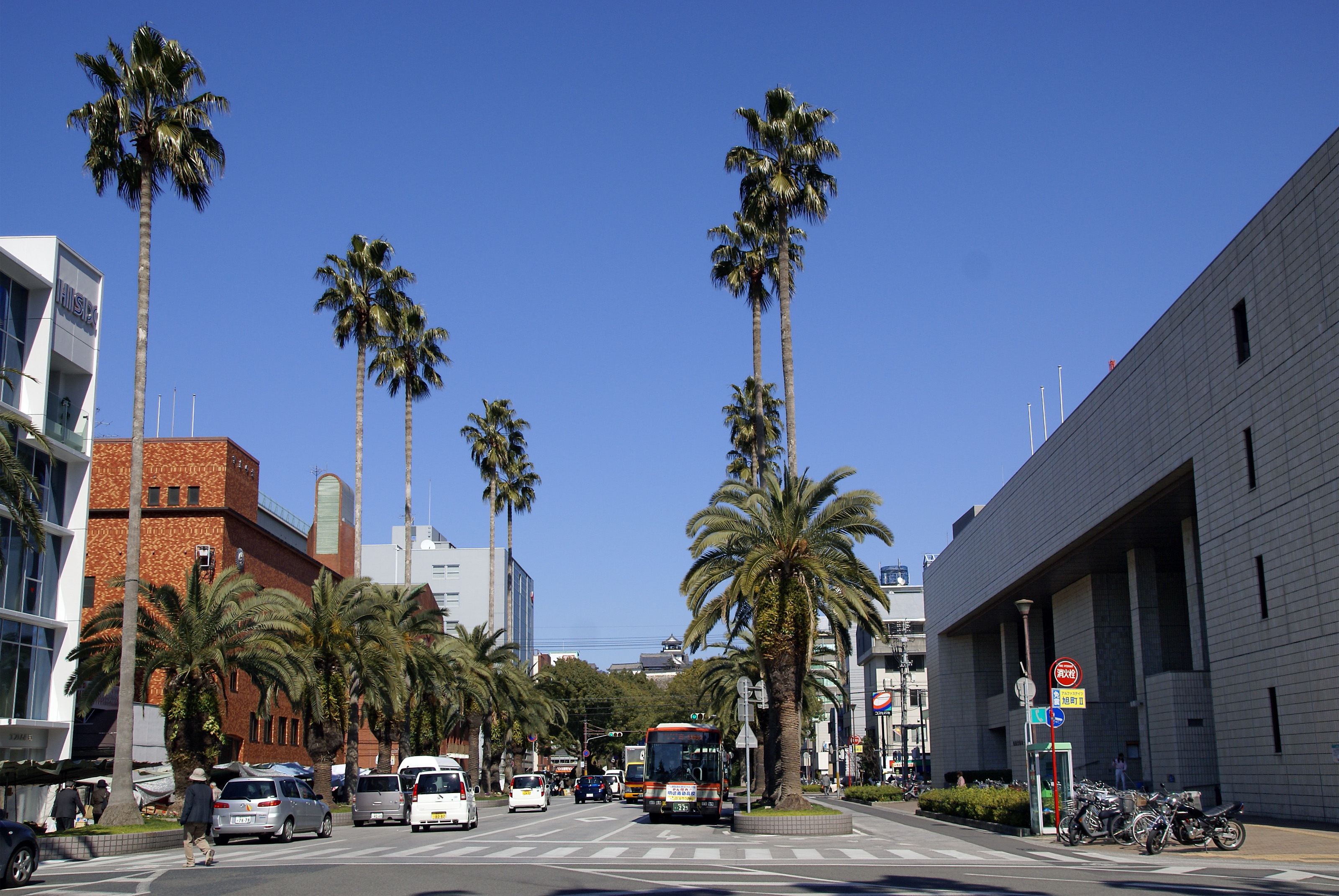 Kochi-kenritsu Kenmin Bunka Hall in Kochi, Kochi prefecture, Japan